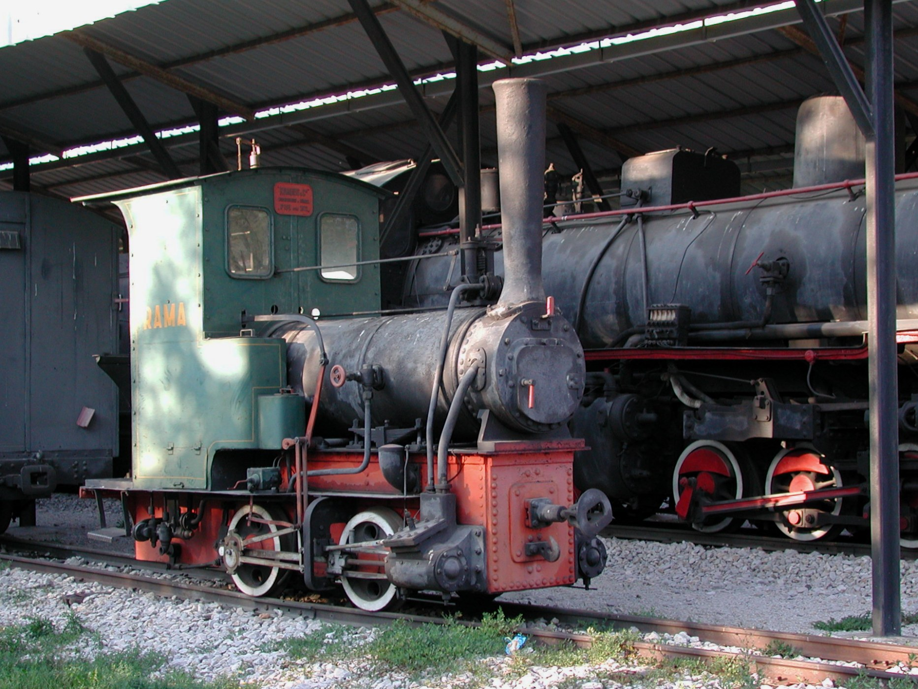 en: Narrow gauge steam locomotive "RAMA" in Požega railway museum, Serbia. This is the oldest loco on 760 mm gauge in the former yugoslavian states. de: Schmalspurlokomotive "RAMA" im Eisenbahnmuseum von Požega in Serbien. Sie ist die älteste Lokomotive mit einer Spurweite von 760 mm in den Staaten des ehemaligen Jugoslawien.